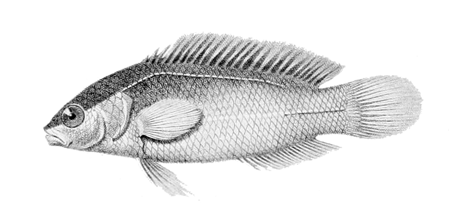 Pseudochromis fuscus